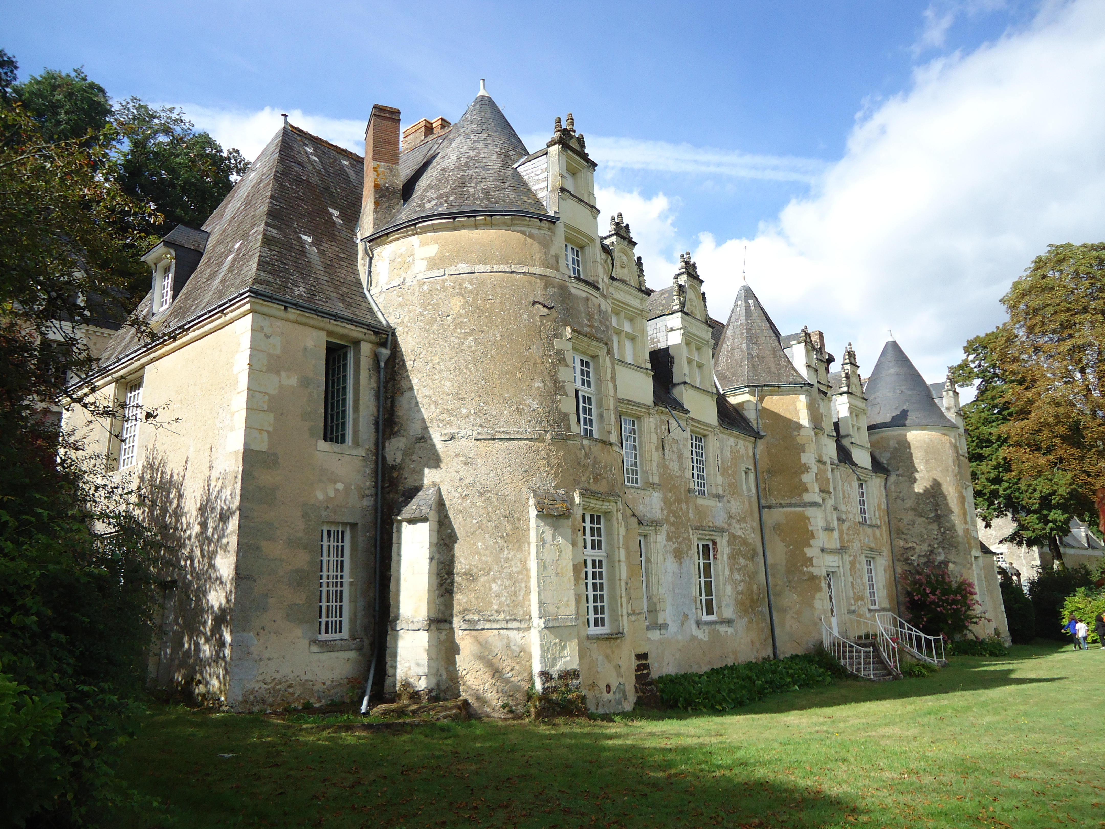 Château de Bénéhard - Chahaignes - Sarthe (72)